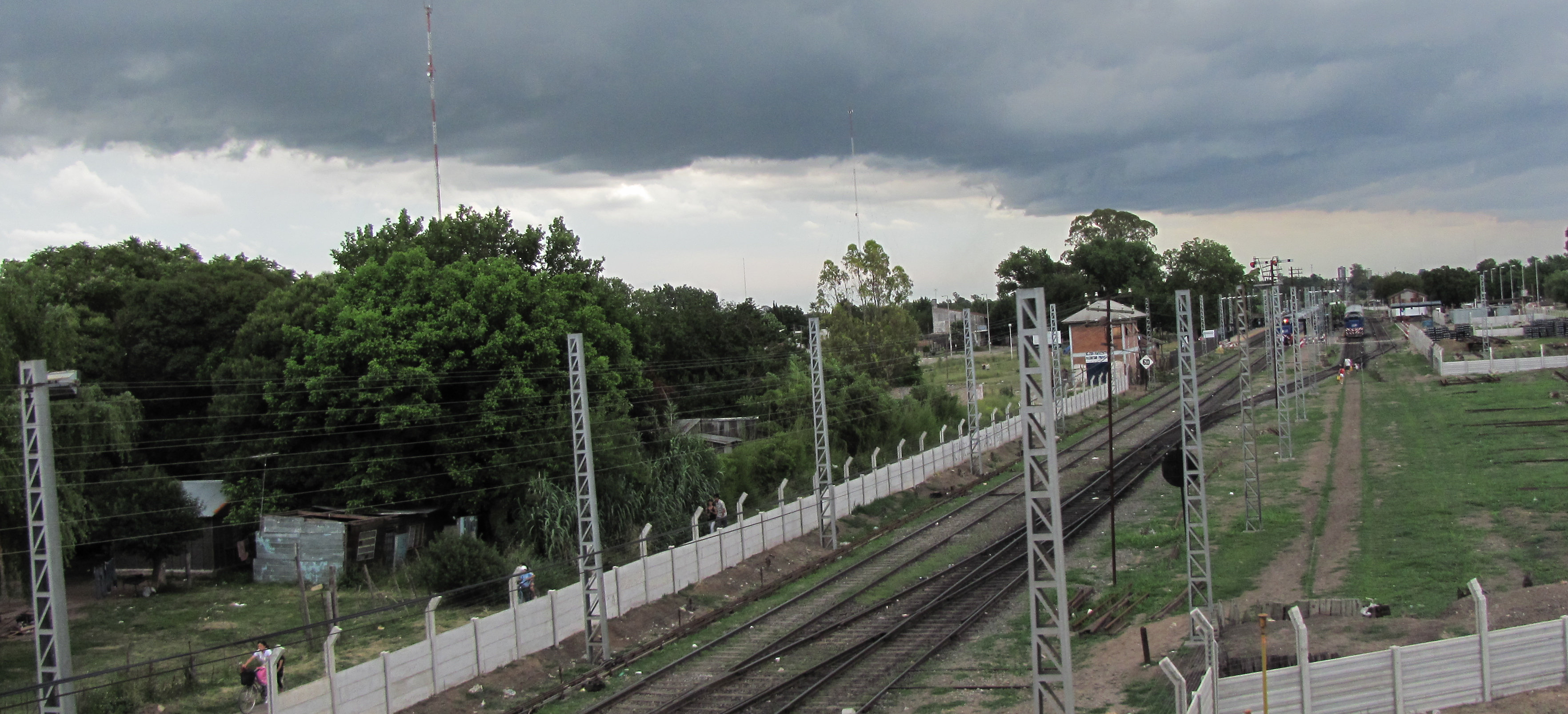 Estacion de Tren Bosques en Florencio Varela